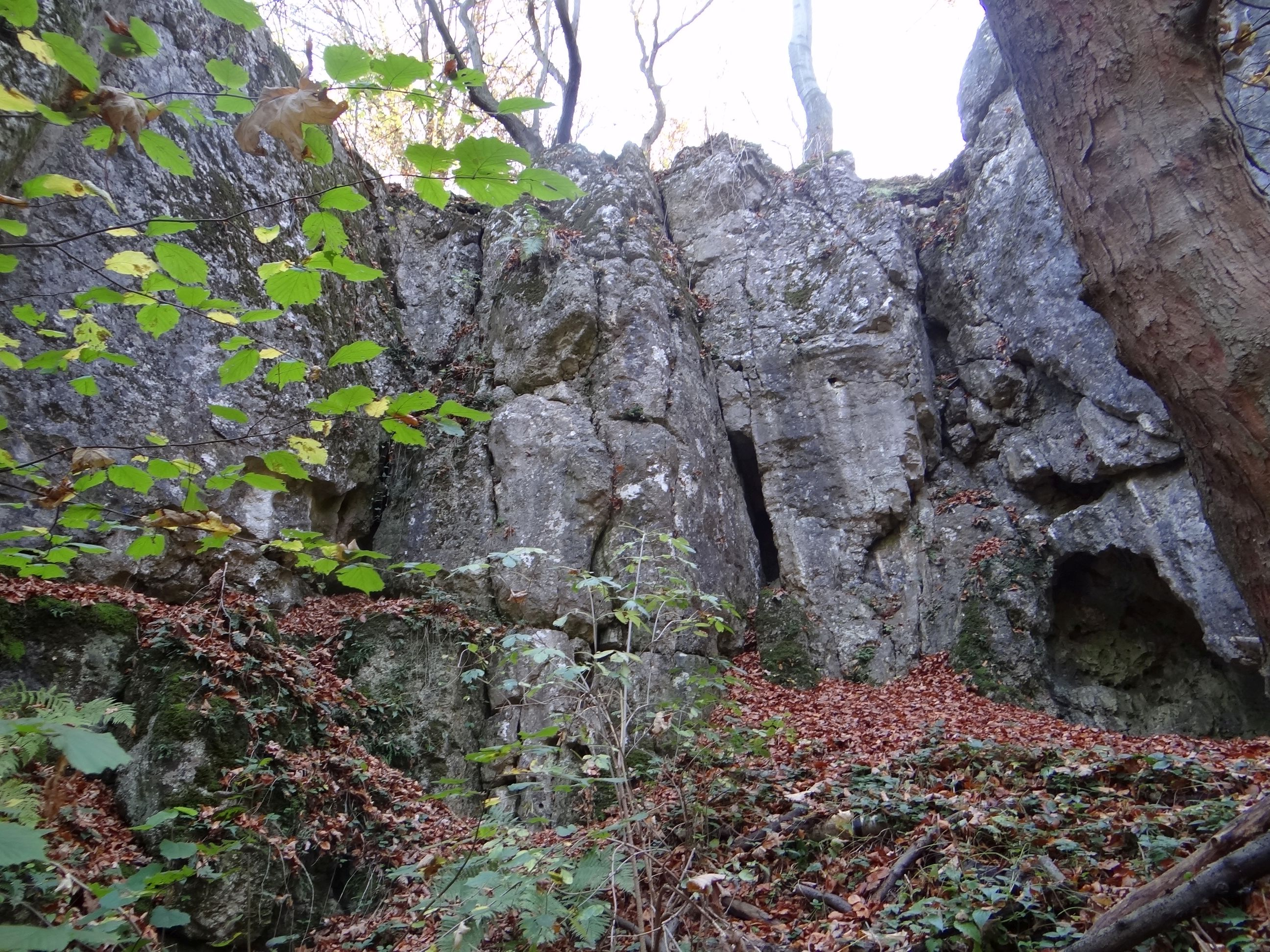 Rezerwat przyrody Panieńskie Skały w Lesie Wolskim w Krakowie